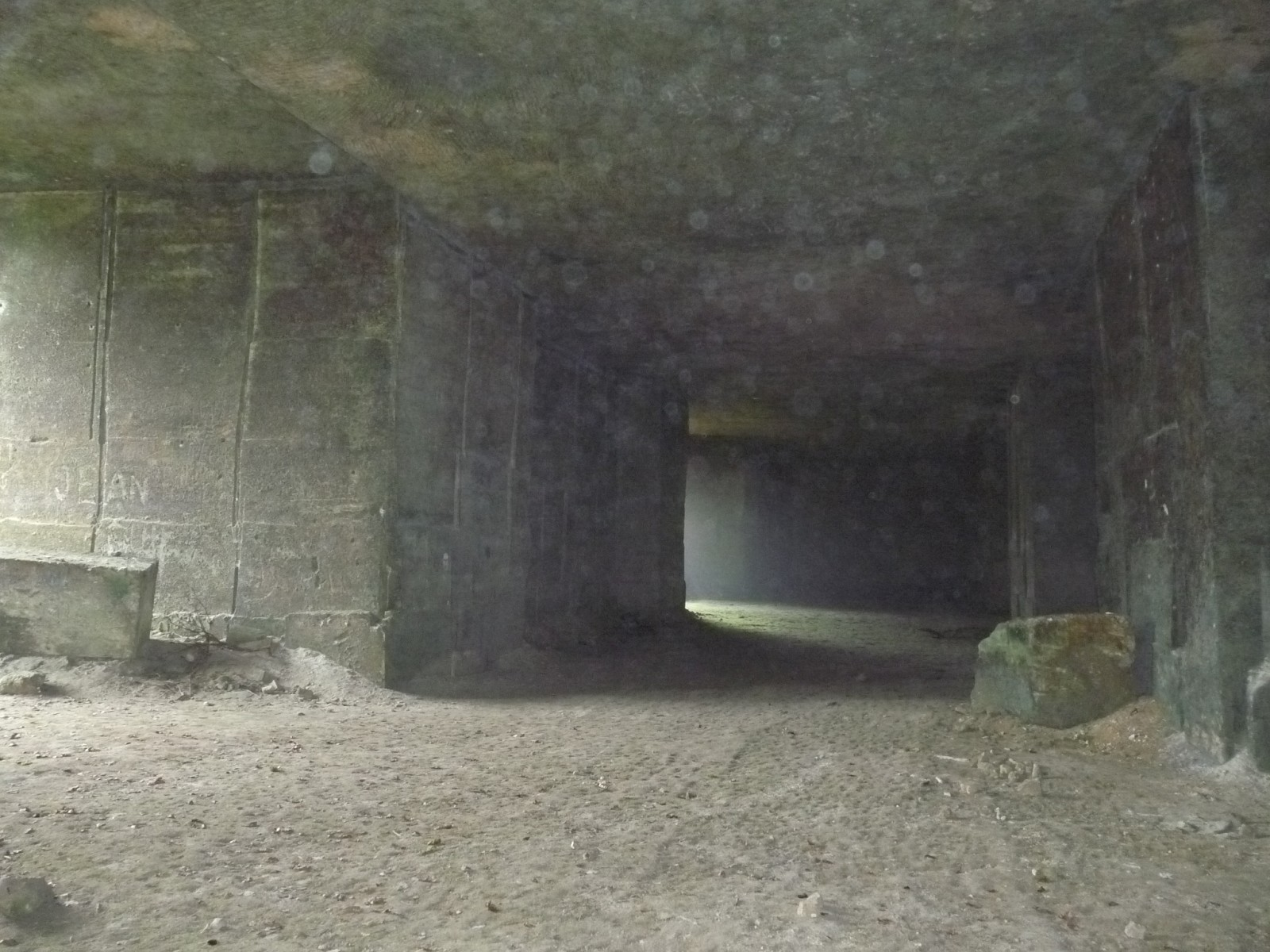 Ancienne carrière de pierre de taille calcaire, plateau d'Argentine, La Rochebeaucourt-et-Argentine, Dordogne, France